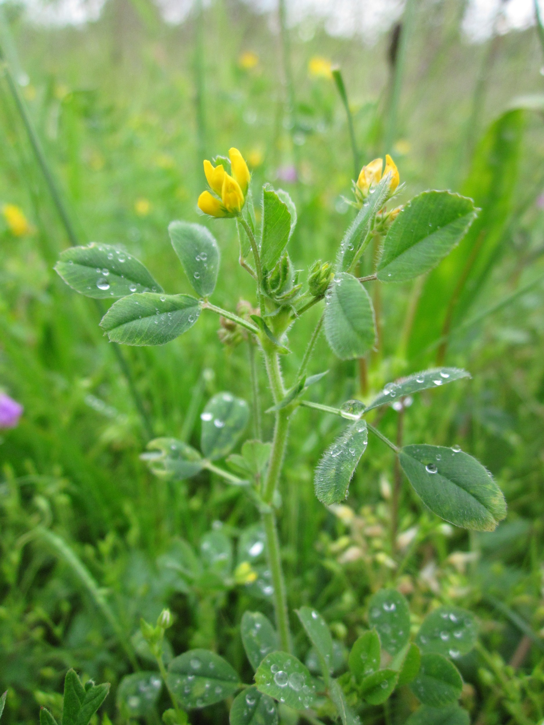 Zwerg-Schneckenklee (Medicago minima) bei Hockenheim